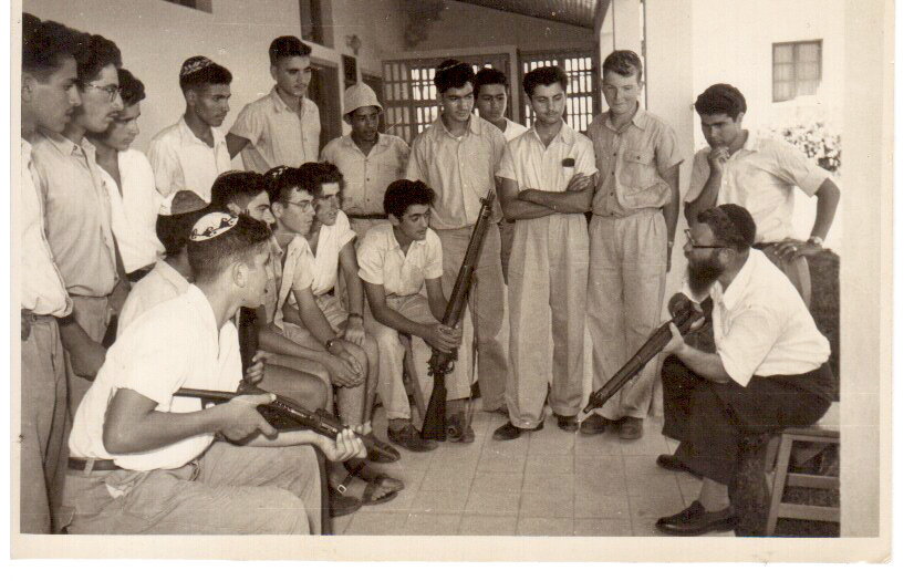 הרב צוקרמן מדריך את תלמידיו בנוגע לאחזקת כלי נשק